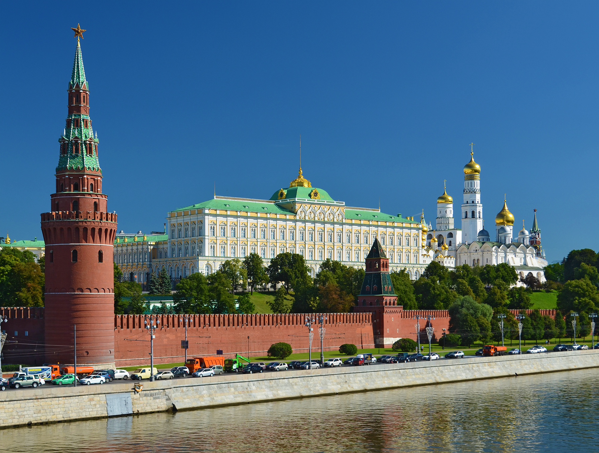 Классический вид